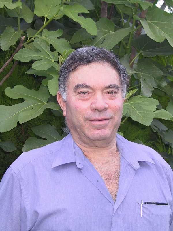 אבינעם דנין